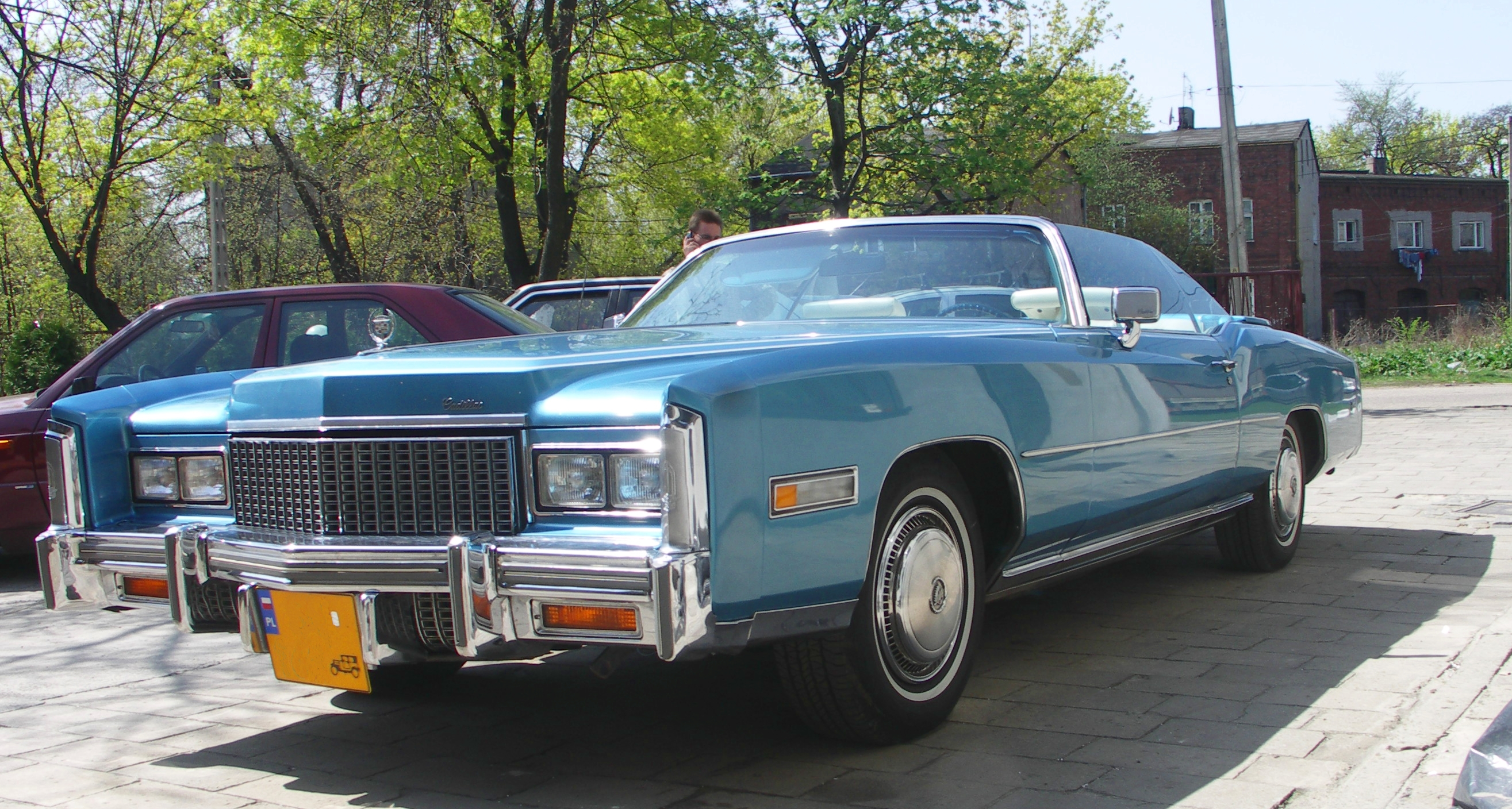 1976 Cadillac Eldorado, Sosnowiec 2006